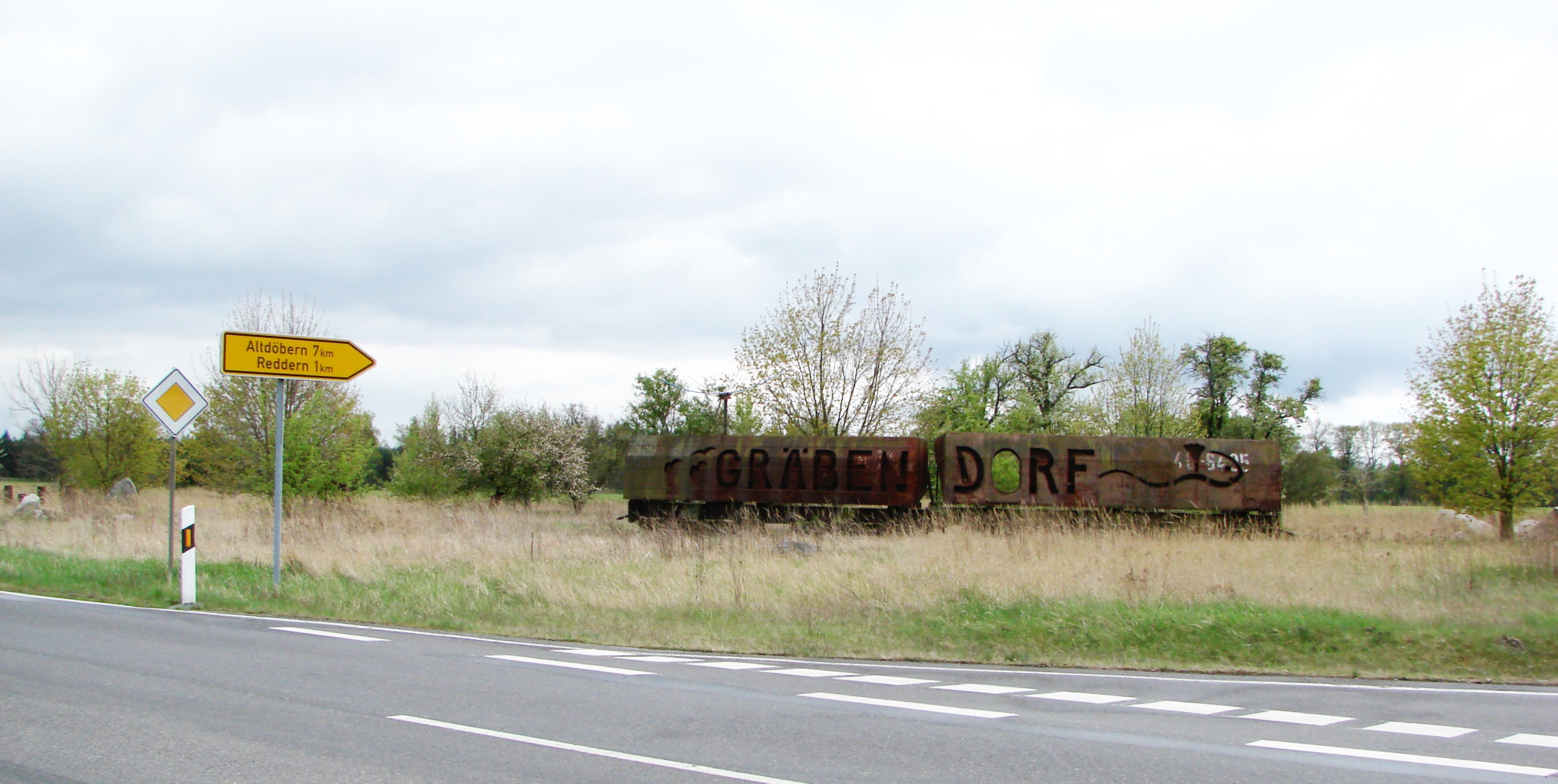 Kunstprojekt auf dem Gebiet des devastierten Ortes Gräbendorf (Gemeinde Reddern).